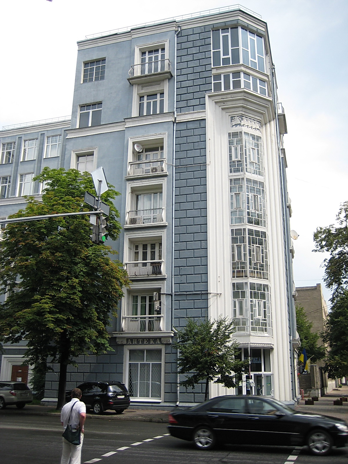 Будинок житловий Управління військового округу (УВО) для комскладу Червоної армії, Київ, Інститутська вул., 15/5